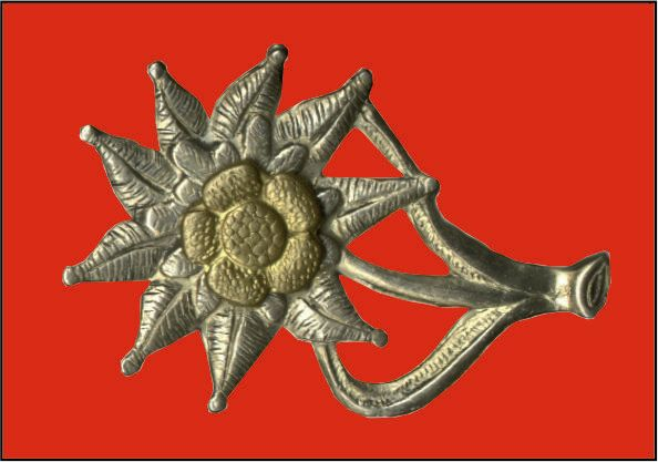 WZÓR GRAFICZNY PROPORCZYKA NA BERET 1. BATALIONU STRZELCÓW PODHALAŃSKICH im. gen. bryg. Józefa Kustronia